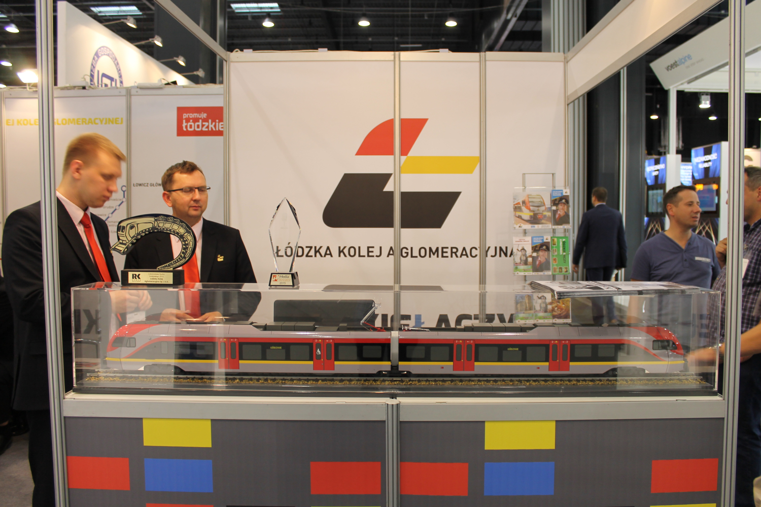 Stoisko Łódzkiej Kolei Aglomeracyjnej podczas targów Trako 2015. The making of this document was supported by Wikimedia Polska Association, within Wikigrant no. WG 2015-34. English | polski | +/−